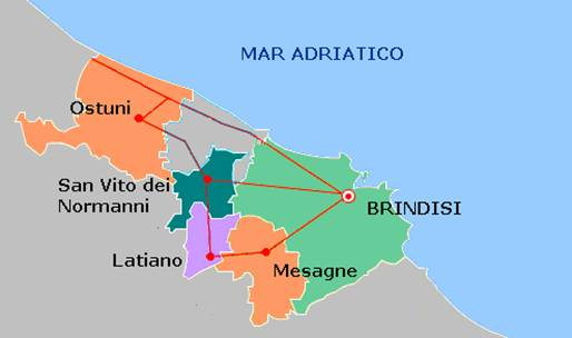 route des vins Appia dei vini (Pouilles, Italie)